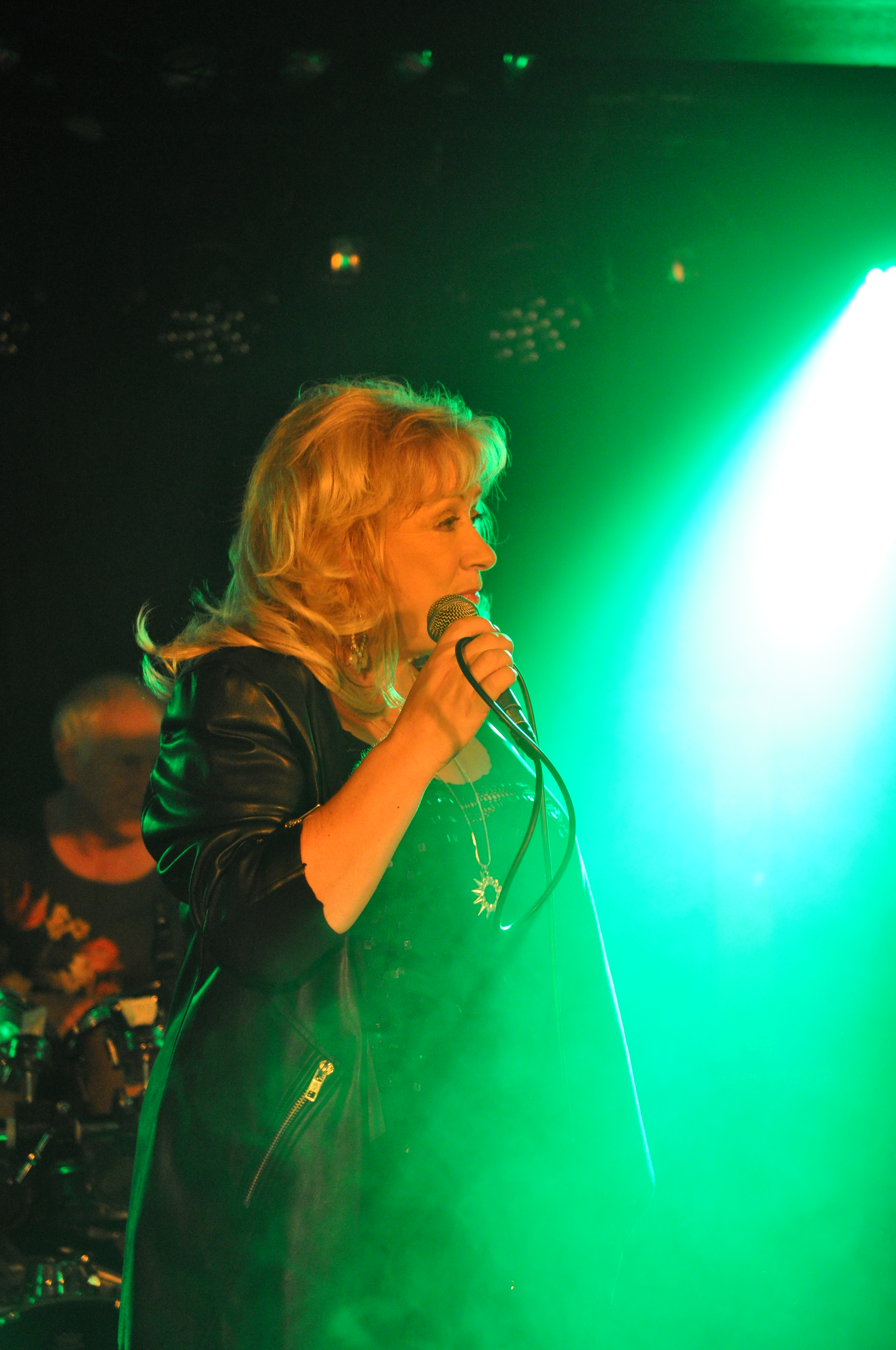 Shakatak am 19. September 2014 im Live Club Barmen in Wuppertal